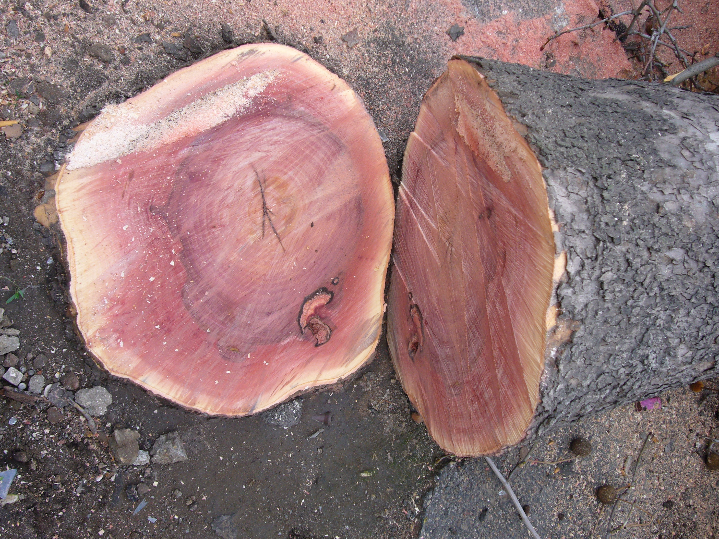 Platano malato (Ceratocystis?)